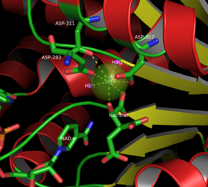 Bildbeschreibung: Katalytisches Zentrum der Isocitrat-Dehydrogenase, isoliert aus E. coli Quelle: selbst erstellt. Fotograf/Zeichner: Minutemen Datum: 24. April 2006 Sonstiges: Abbildung erstellt aus pdb 1AI3 ( mit pymol 0.99